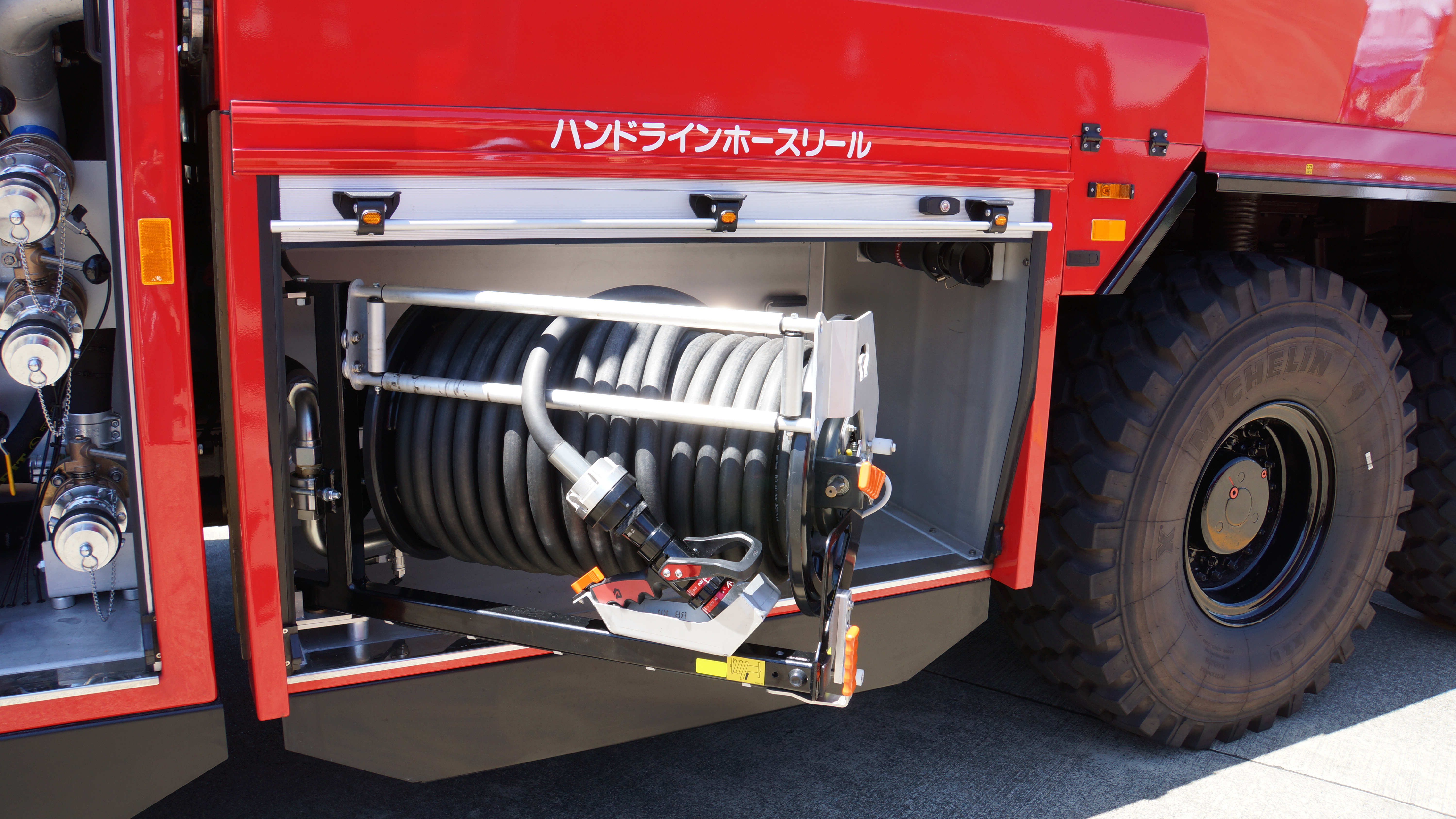 海上自衛隊 救難消防車IB型（ローゼンバウアー社製パンター6×6） ハンドラインホースリール。 2015年7月26日 舞鶴航空基地にて。